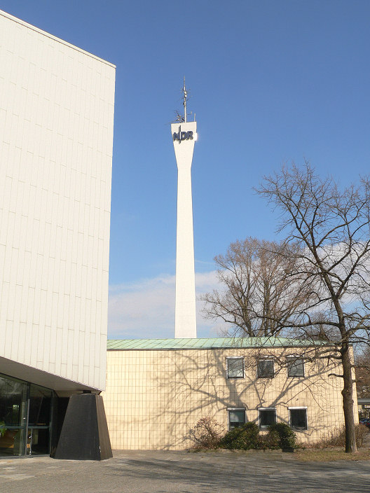 NDR-Studio Hannover (Großer Sendesaal) am Maschsee Foto aufgenommen von Benutzer Axel Hindemith, März 2006